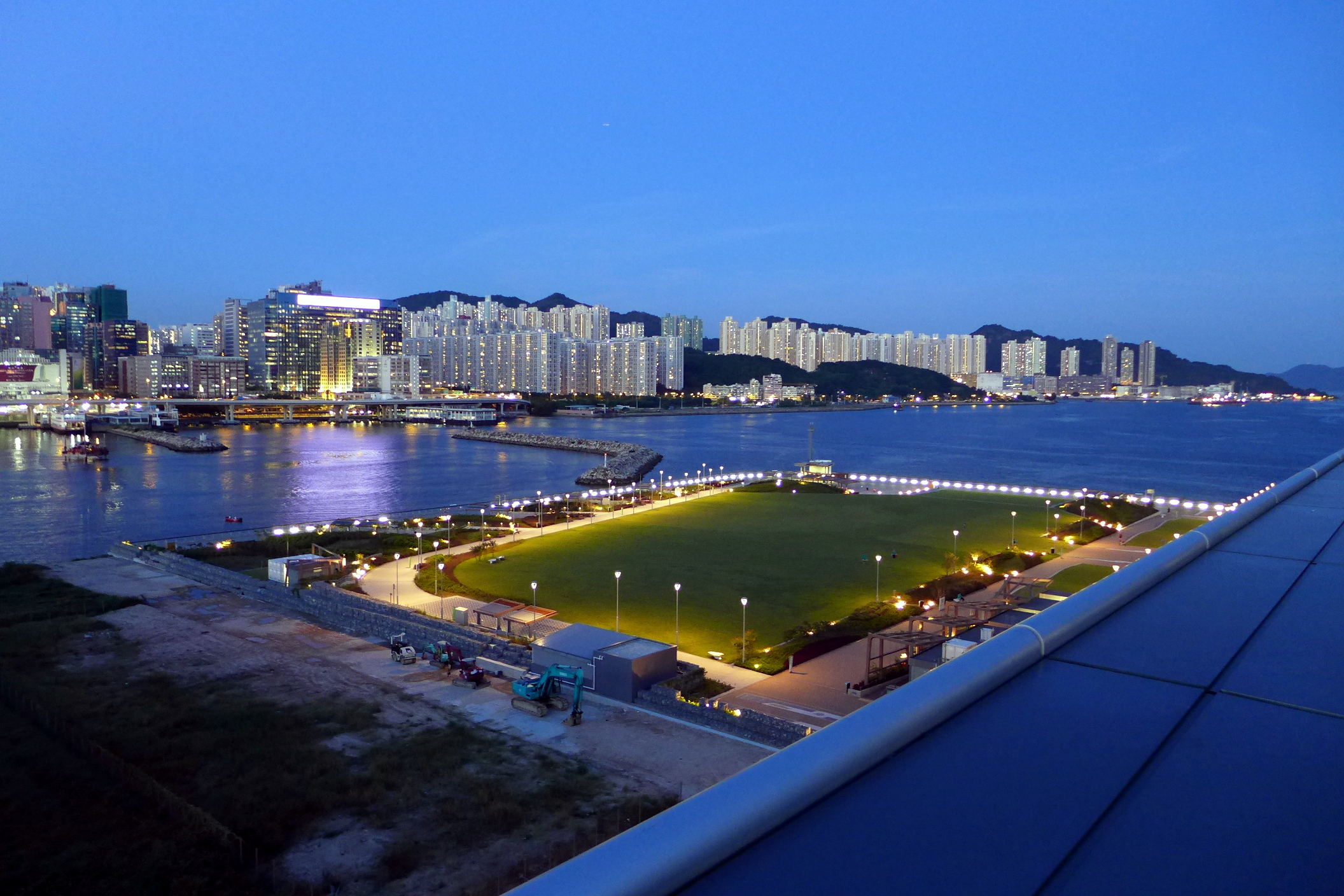 Kai Tak Runway Park Night View